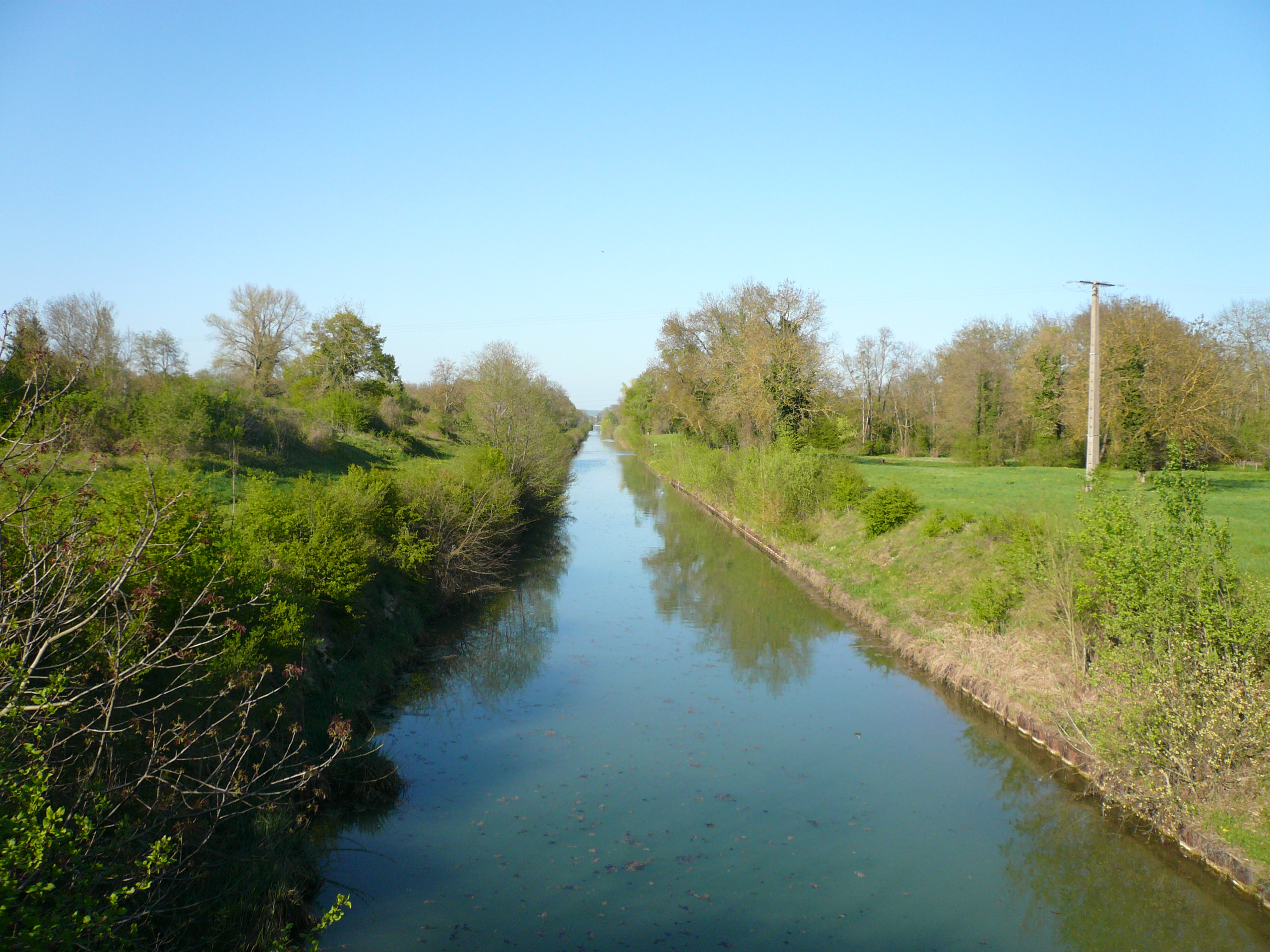 Canal des Ormes ou canal d'amenée de la Seine à l'usine des Ormes-sur-Voulzie, Seine-et-Marne, Île-de-France, France